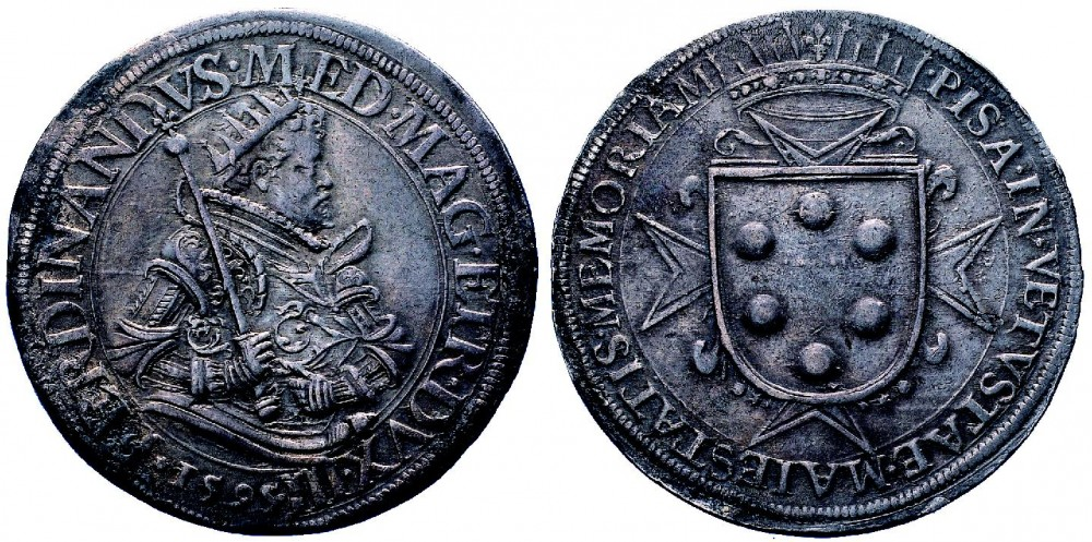 Tallero risalente al 1595 raffigurante Ferdinando I de' Medici